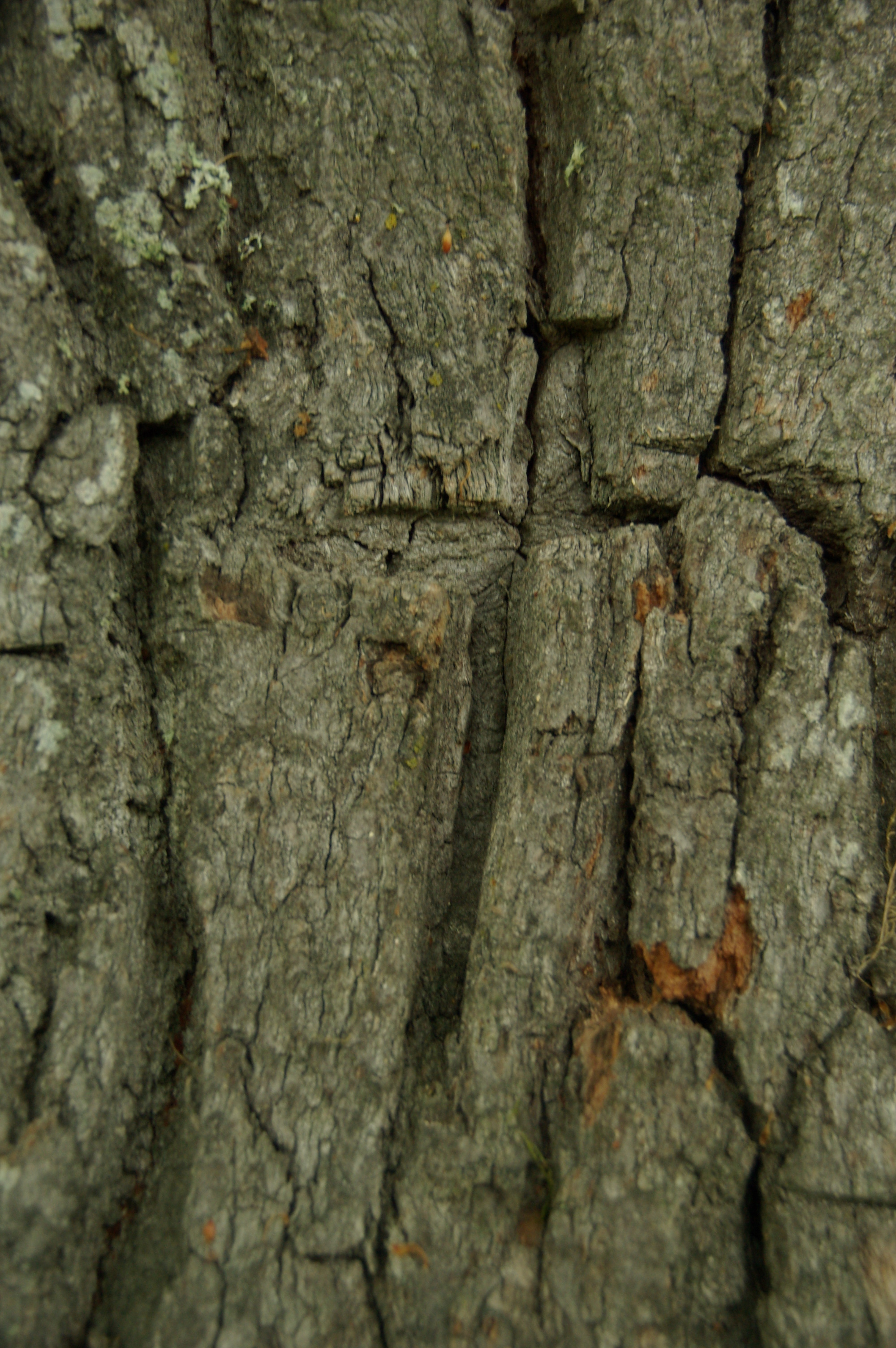 Mustahamba tamm kasvab Haanja vallas Raagi külas Suuretamme talu lähedal.